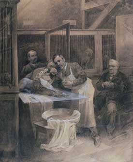 Pasteur extrai o vírus da raiva em um cão infectado